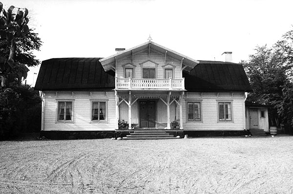 Länna gård huvudbyggnad